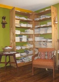 Un racó acollidor de la biblioteca Fundació Paulí Bellet